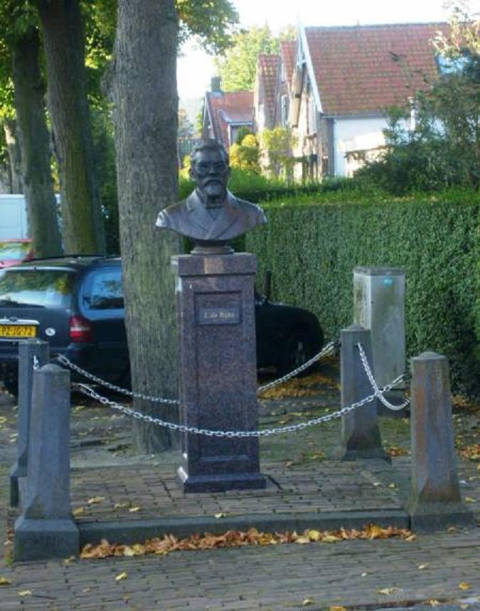 Monument van Johannis de Rijke in Colijnsplaat.